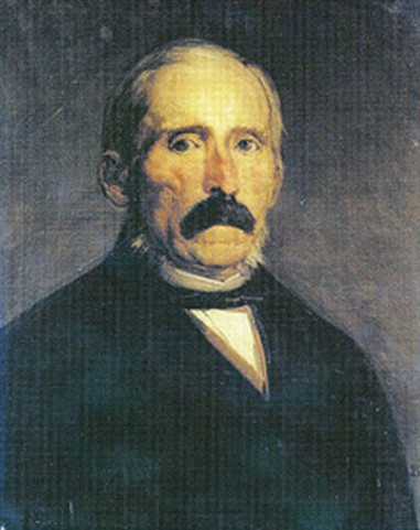 Retrato del filósofo y pedagógo español Julián Sanz del Río, pintado por Miguel Pineda Montón, hacia 1860. Ateneo de Madrid.